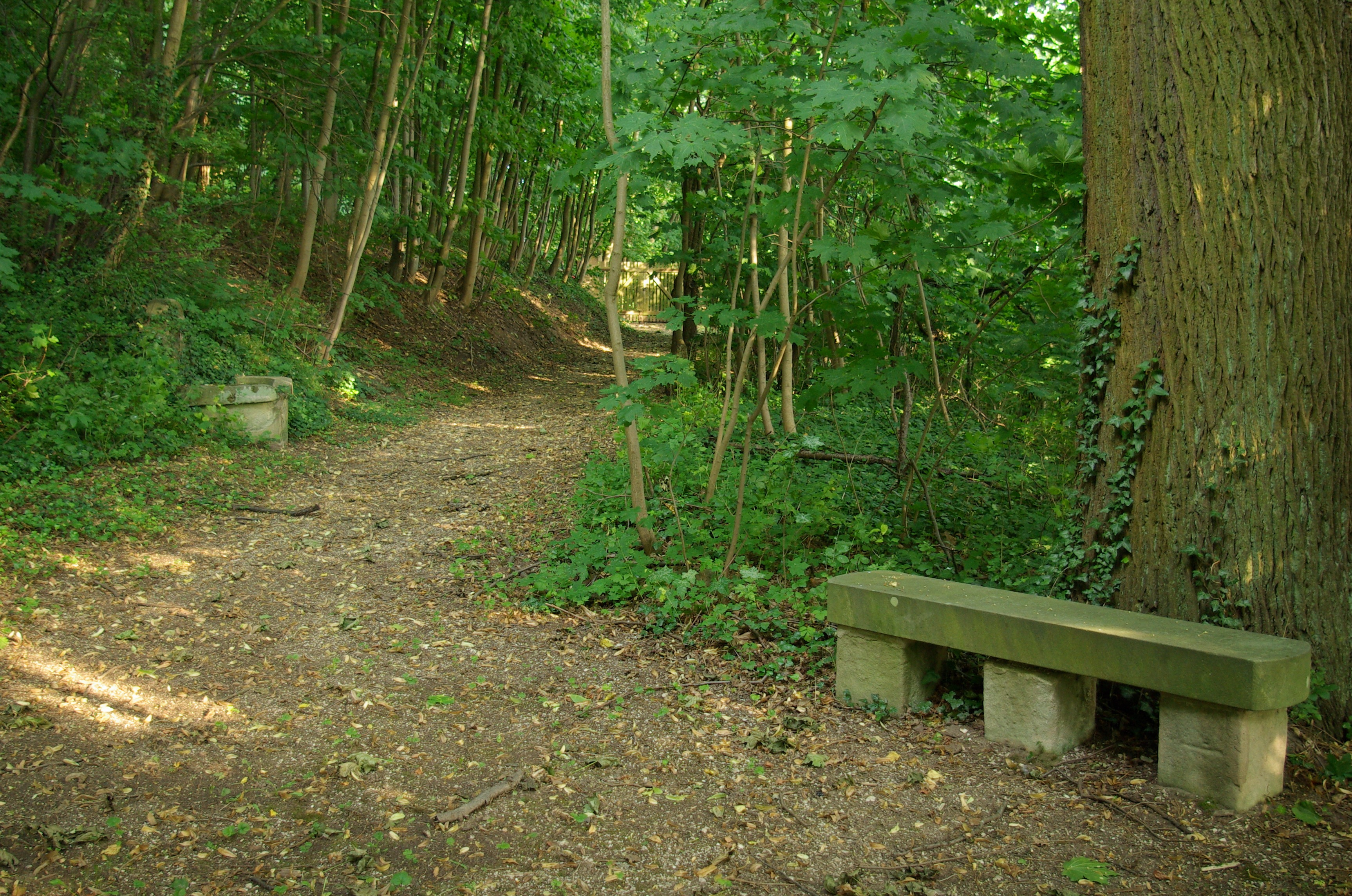 Gefasste Quelle und Ruhebank im Fleischmannschen Garten auf dem Burgberg in Erlangen.